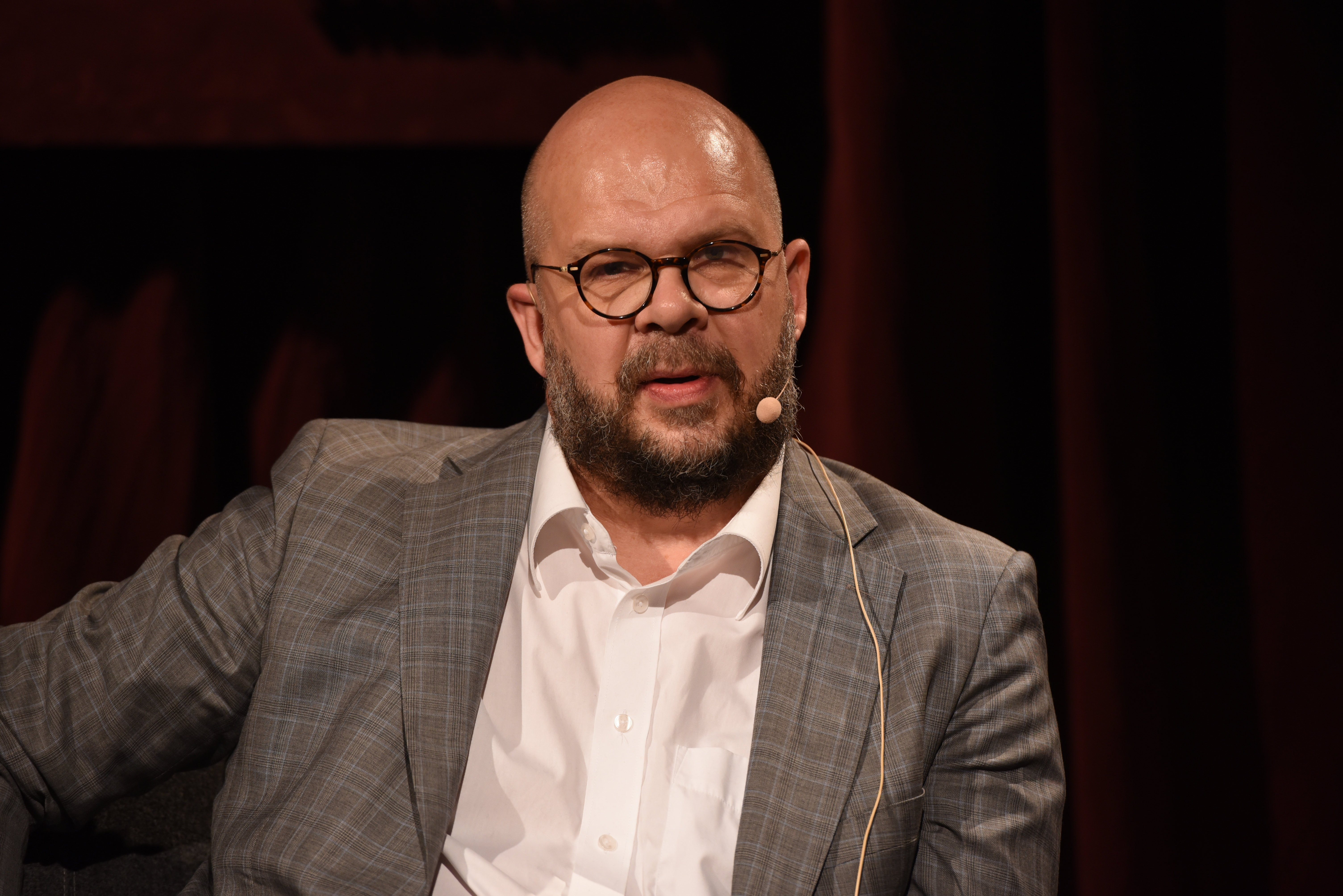 Den svenske idéhistorikern Johan Sundeen på Bokmässan 2017.